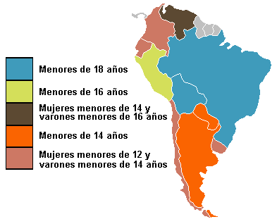 Mapa que muestra la edad que se considera jurídicamente incapaz a una persona en los países de Sudamérica.